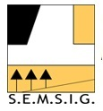 Logotipo de la Sociedad Española de Mecánica del Suelo e Ingeniería Geotécnica